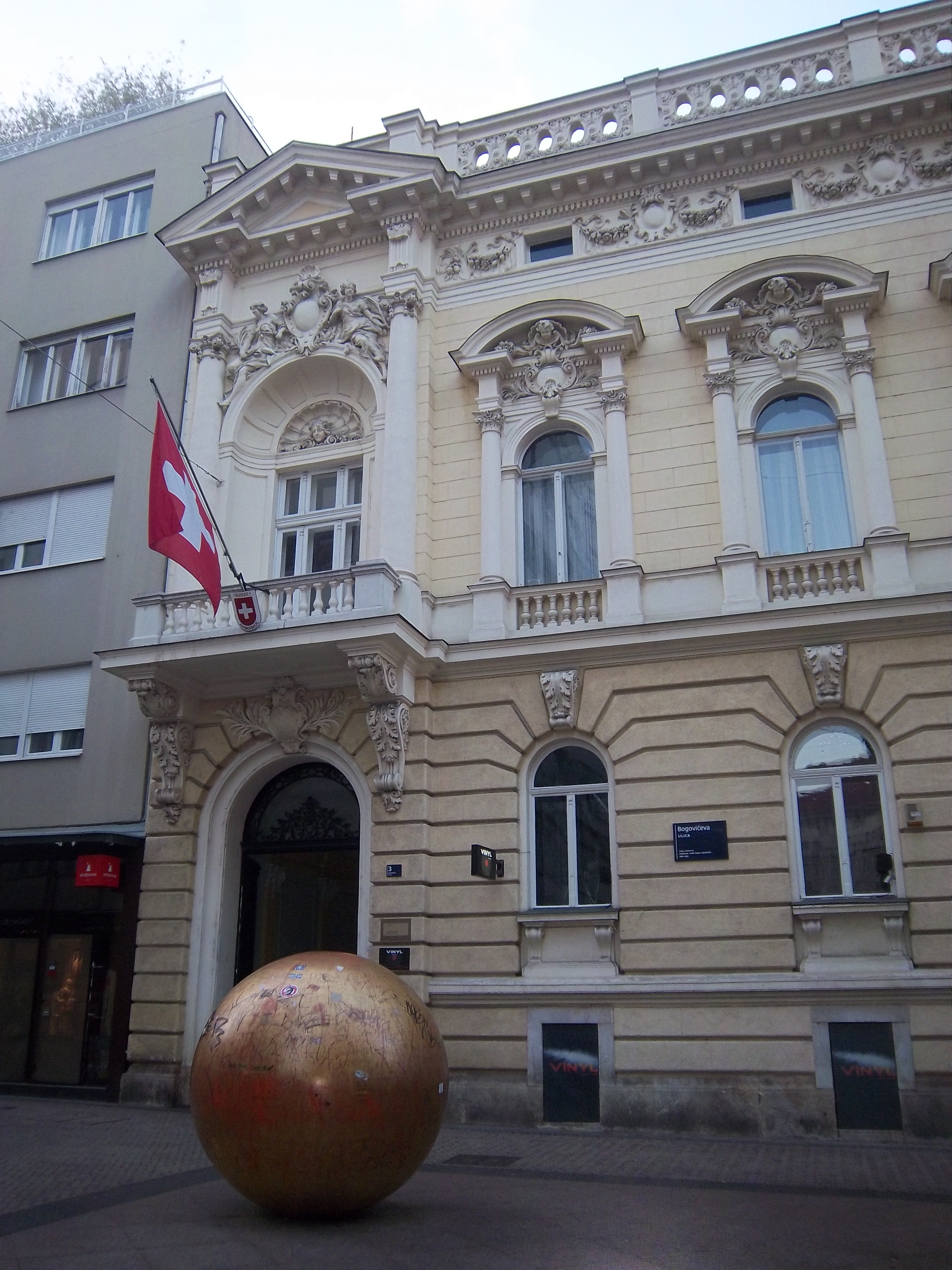 Srpskohrvatski / српскохрватски: Ambasada Švicarske u Hrvatskoj i Zagrebačko sunce.